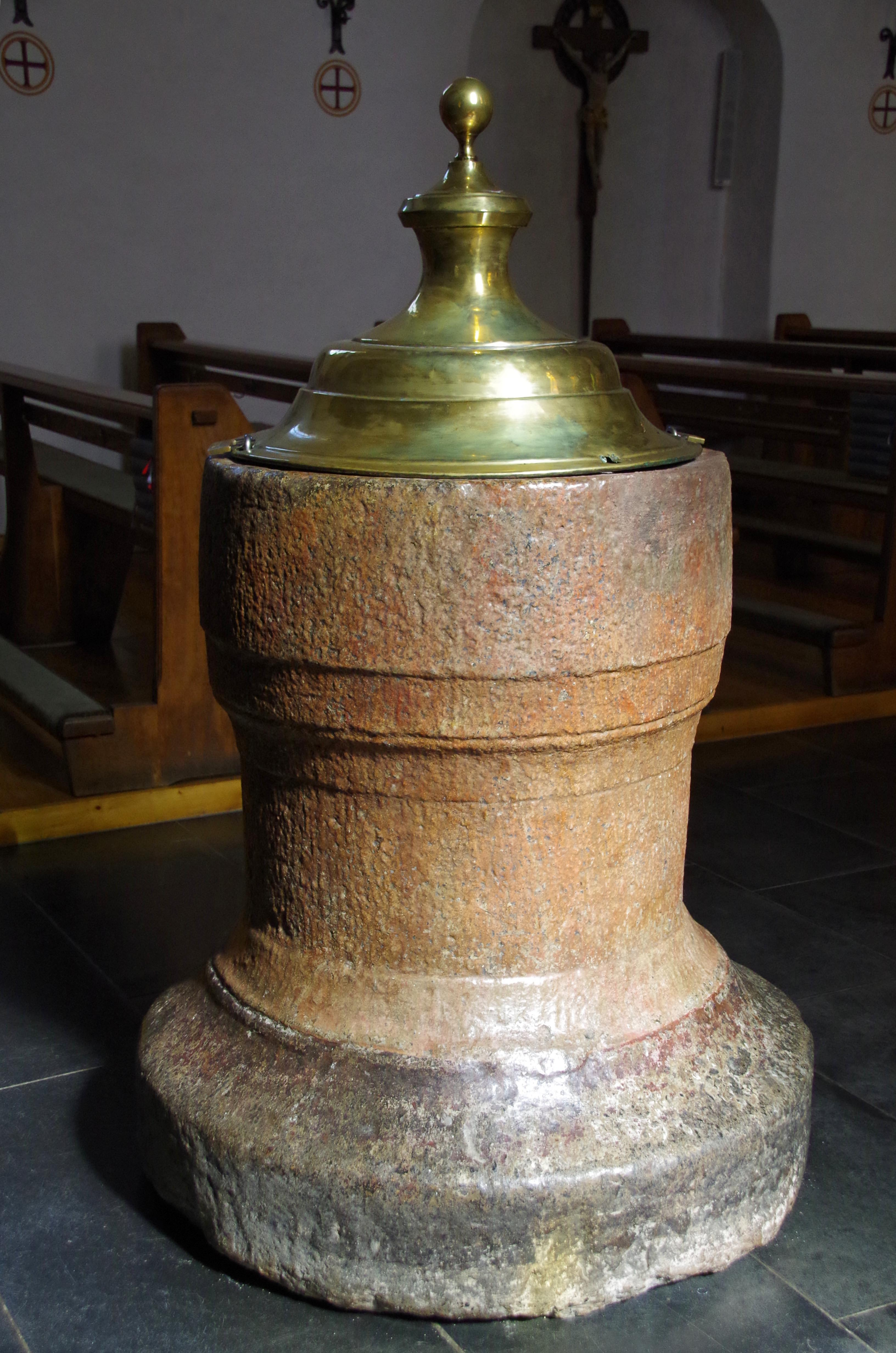 St. Johann Baptist (Ripsdorf), Taufstzein (15. Jahrhundert)